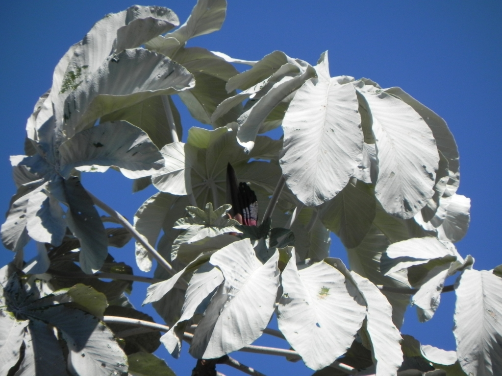 Cecropia hololeuca Miq. - URTICACEAE - Parque Estadual do Rio Preto - São Gonçalo do Rio Preto - Minas Gerais - Brasil.